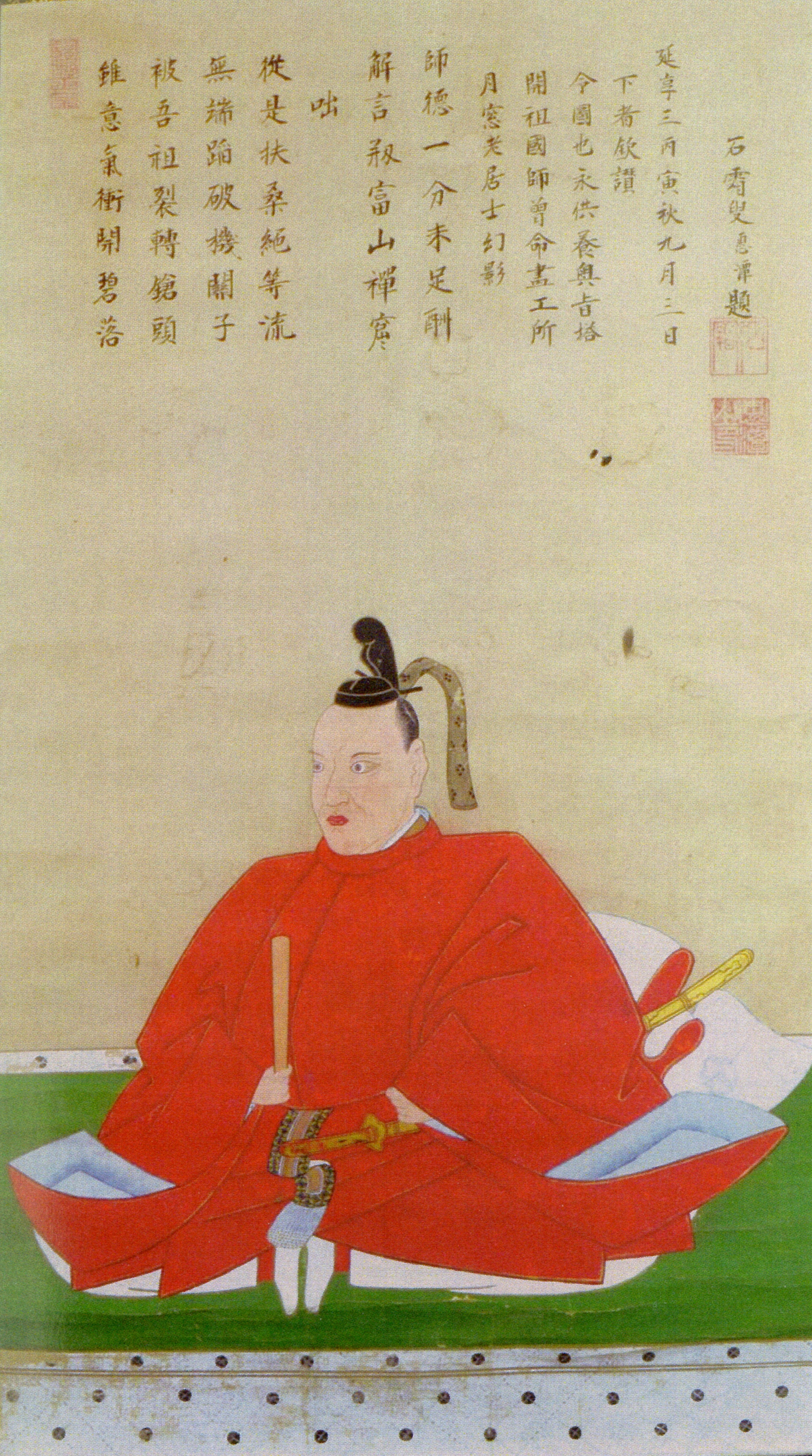 加藤泰興の肖像。